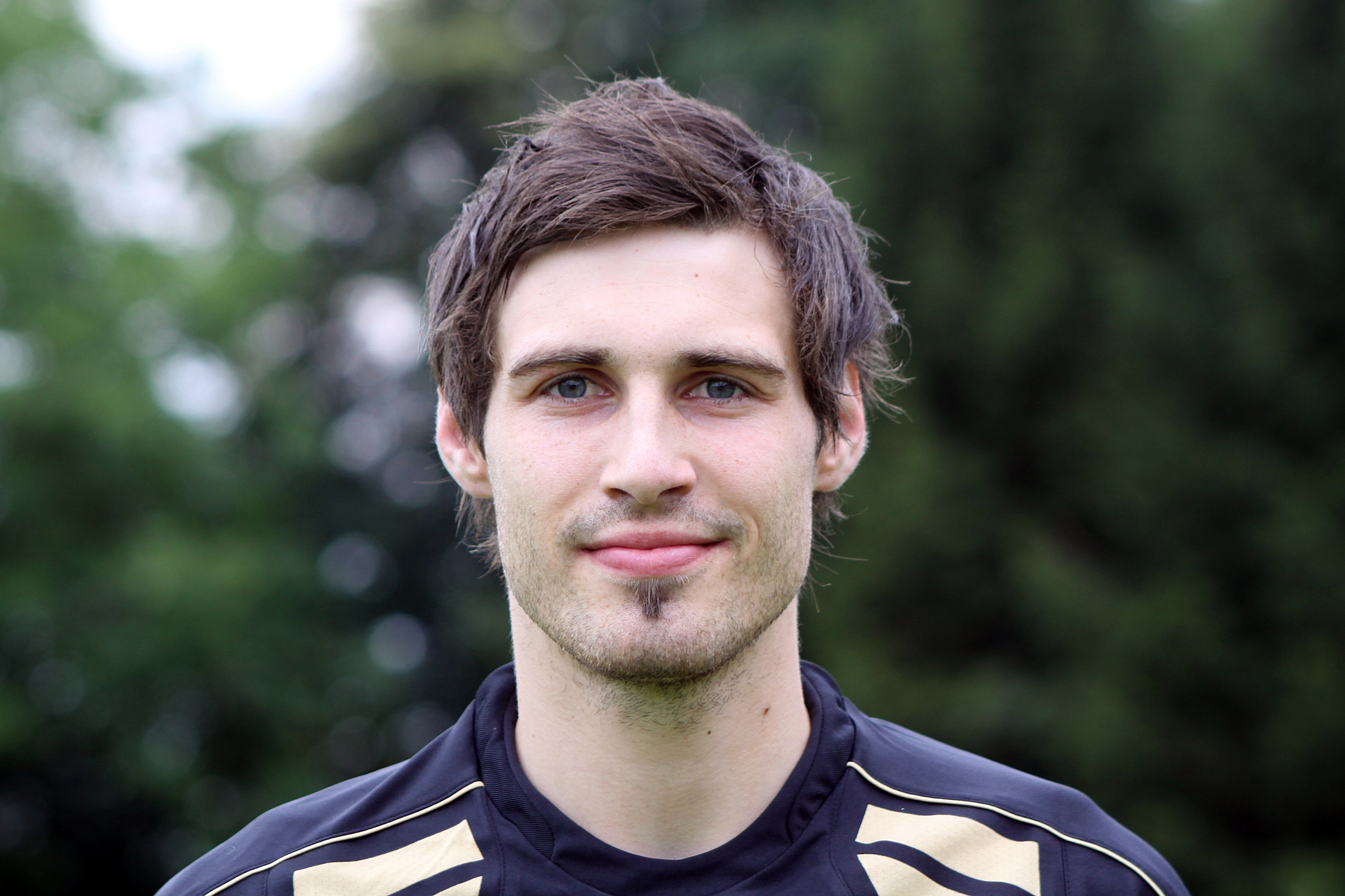 Martin Kager - TSV Hartberg (2)